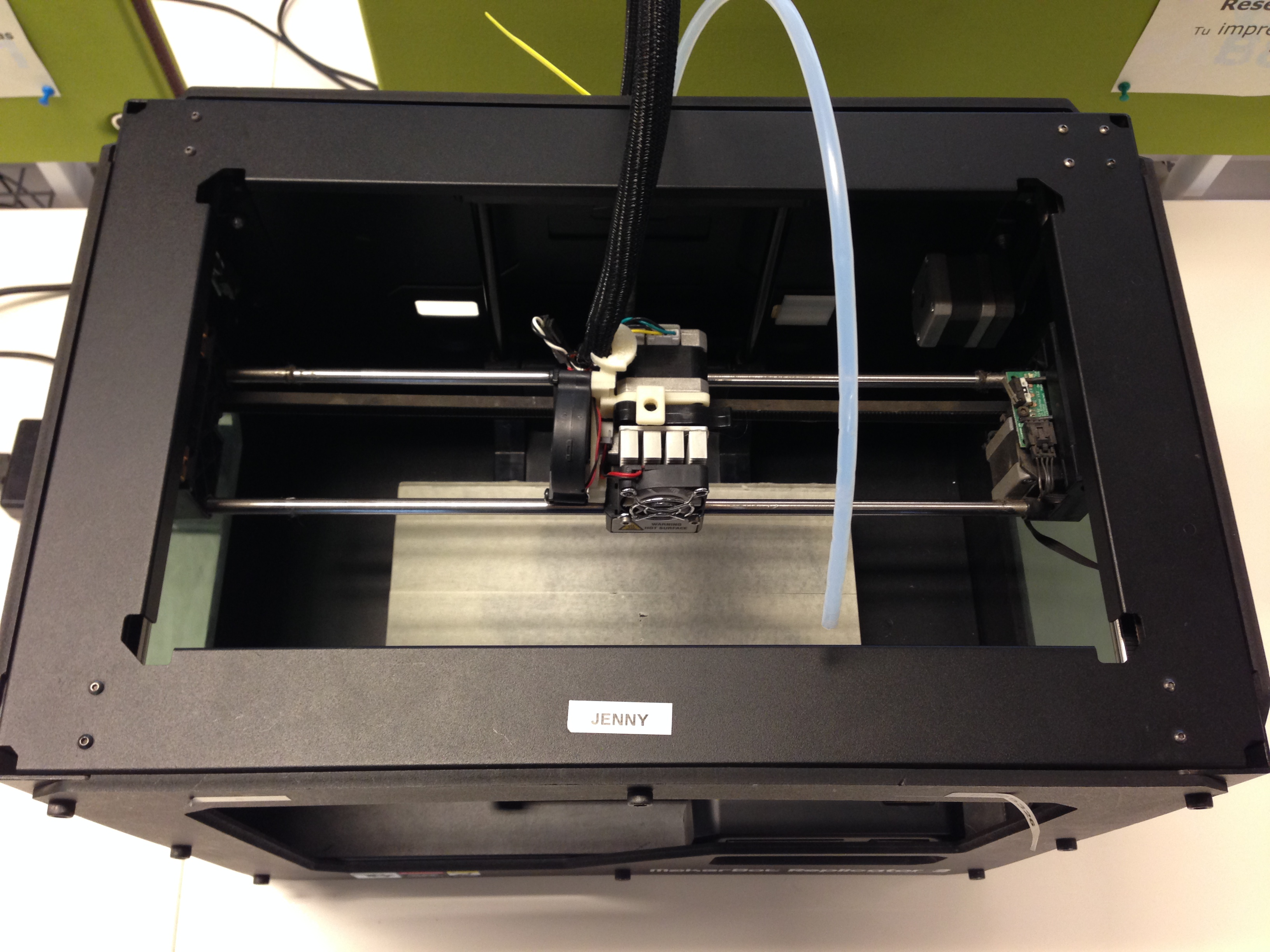 imprime en plásticos termo-plásticos